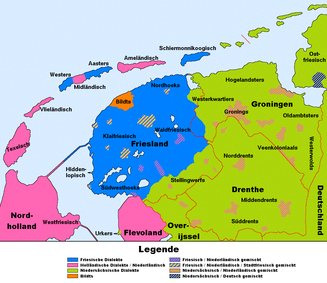 Traditionelle Sprachsituation in den nördlichen Niederlanden (Provinzen Friesland, Groningen, Drenthe und angrenzende Gebiete)